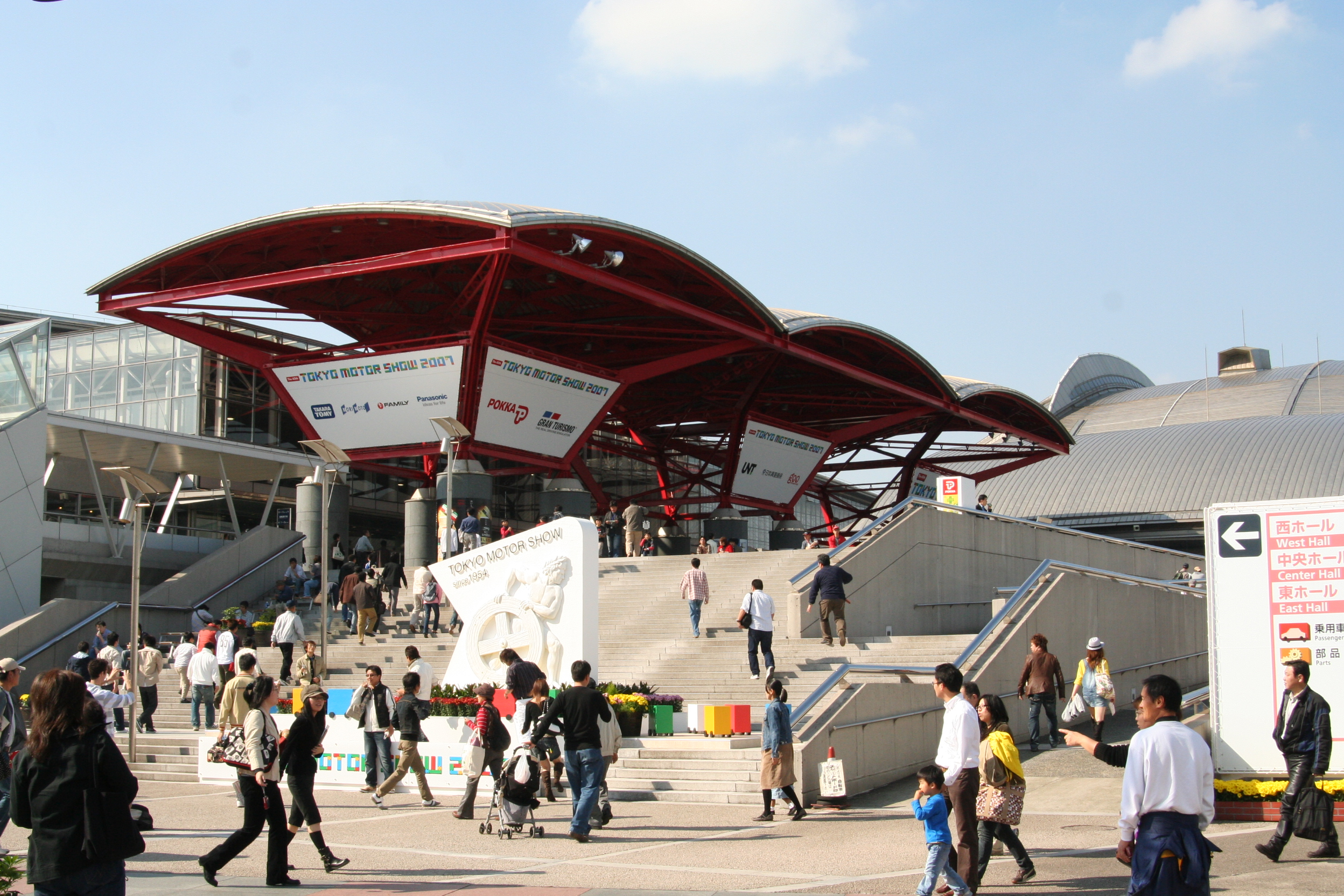 Entrance